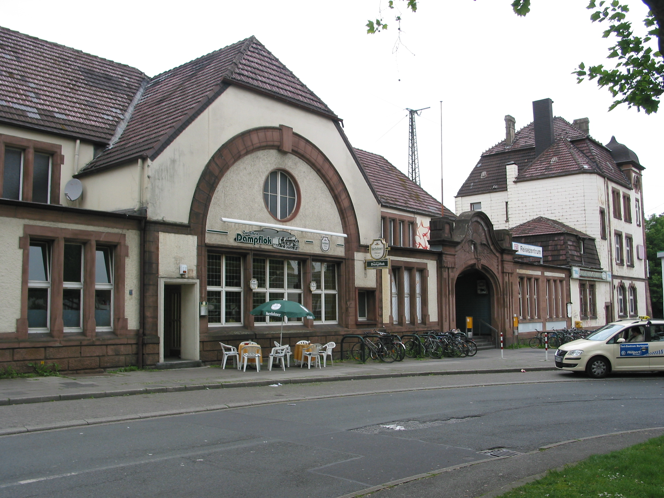 Bahnhof Schwerte (Ruhr) This is a photograph of an architectural monument. 115